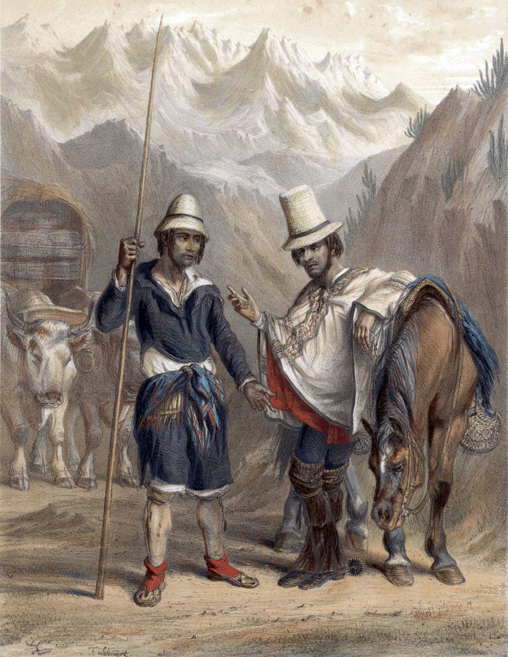 Grabado de un peón y un capataz